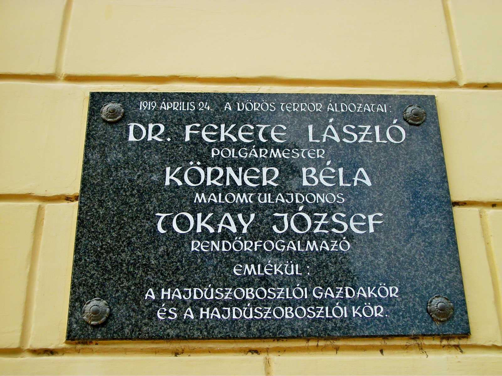 Vörös terror áldozatainak emléktáblája Hajdúszoboszlón.